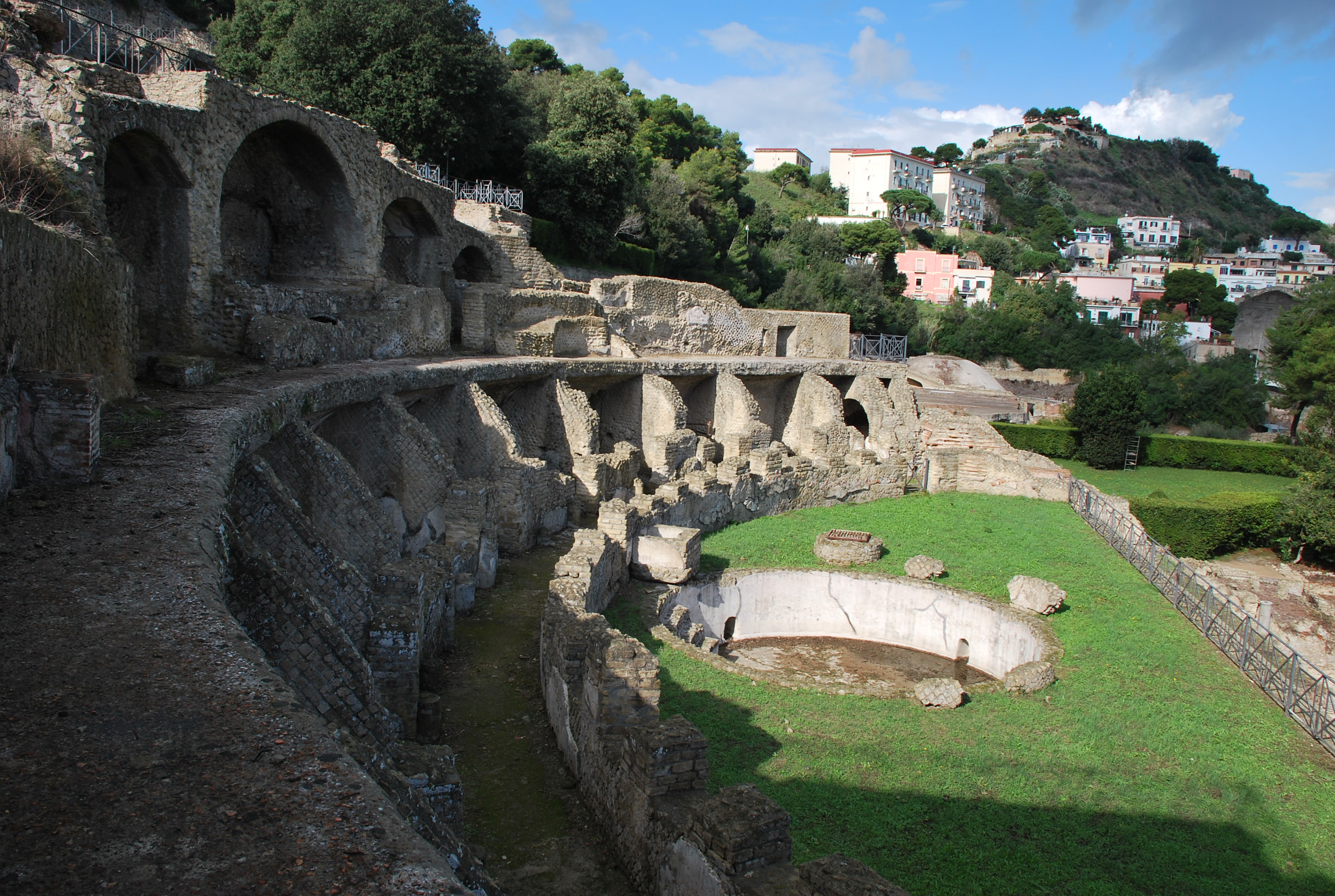 Bacoli (NA) Scavi Terme romane 2 Novembre 2013